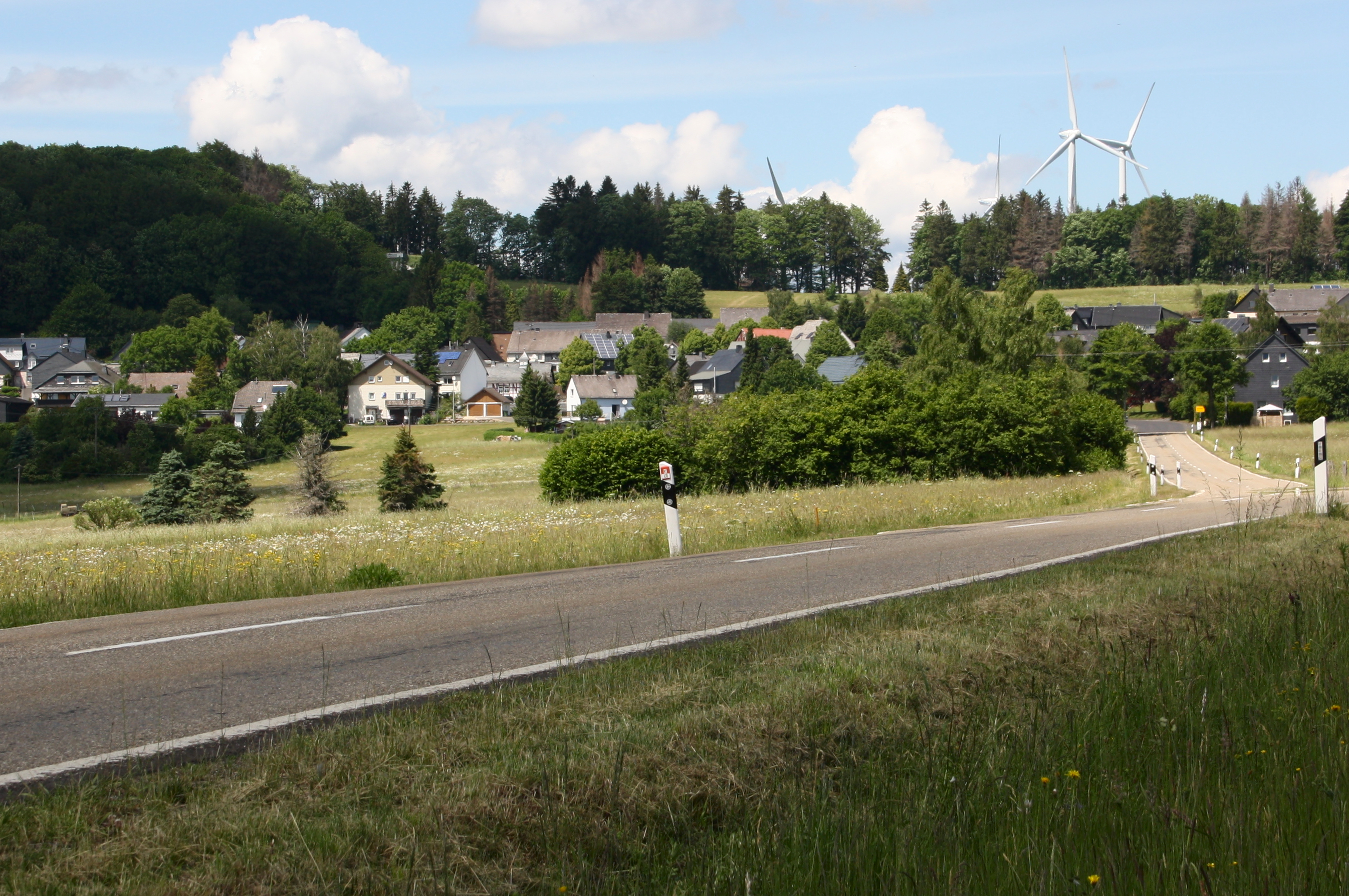 Homberg, Westerwald, Rheinland-Pfalz, Deutschland